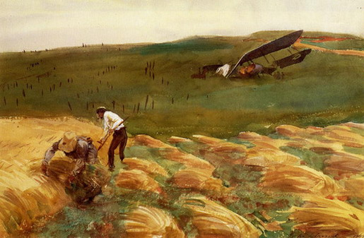 Crashed Aeroplane by John Singer Sargent 1918.jpg